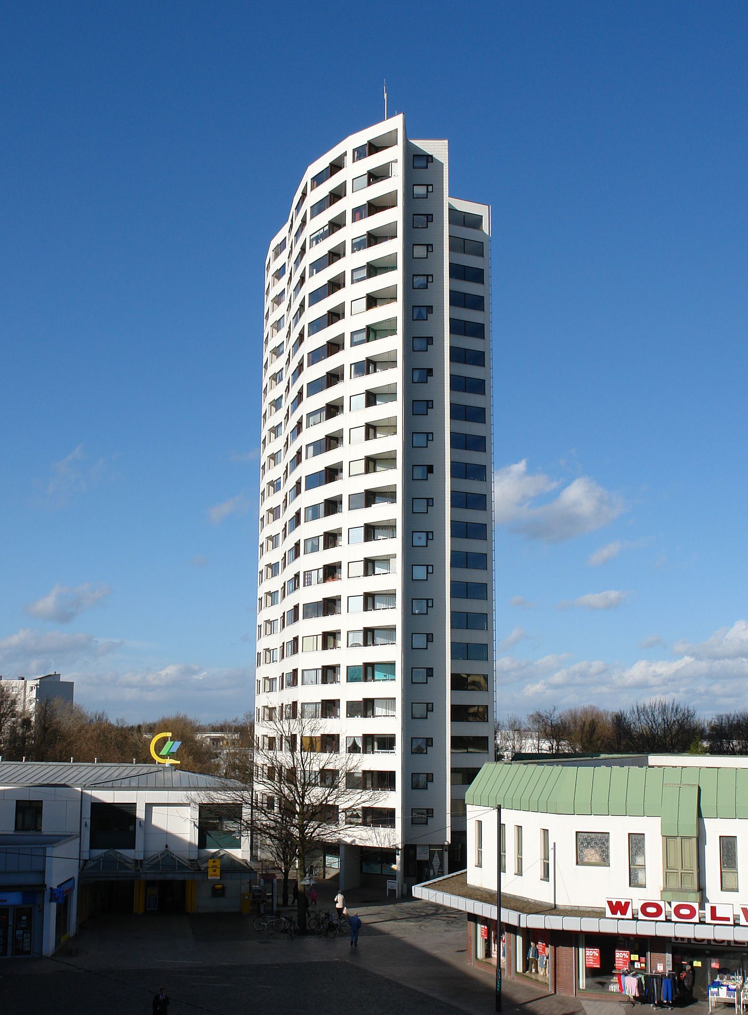 Aalto-Hochhaus in Bremen Vahr. Erbaut 1959-61 Das abgebildete Objekt ist ein geschütztes Kulturdenkmal in der Freien Hansestadt Bremen, mit der Nr. 0123 beim Landesamt für Denkmalpflege registriert.